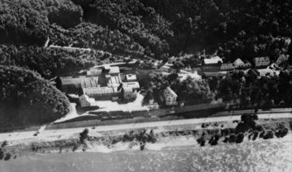 Aufbereitungsanlagen der Grube Gute Hoffnung bei St.Goar-Fellen an der B9. 1953.